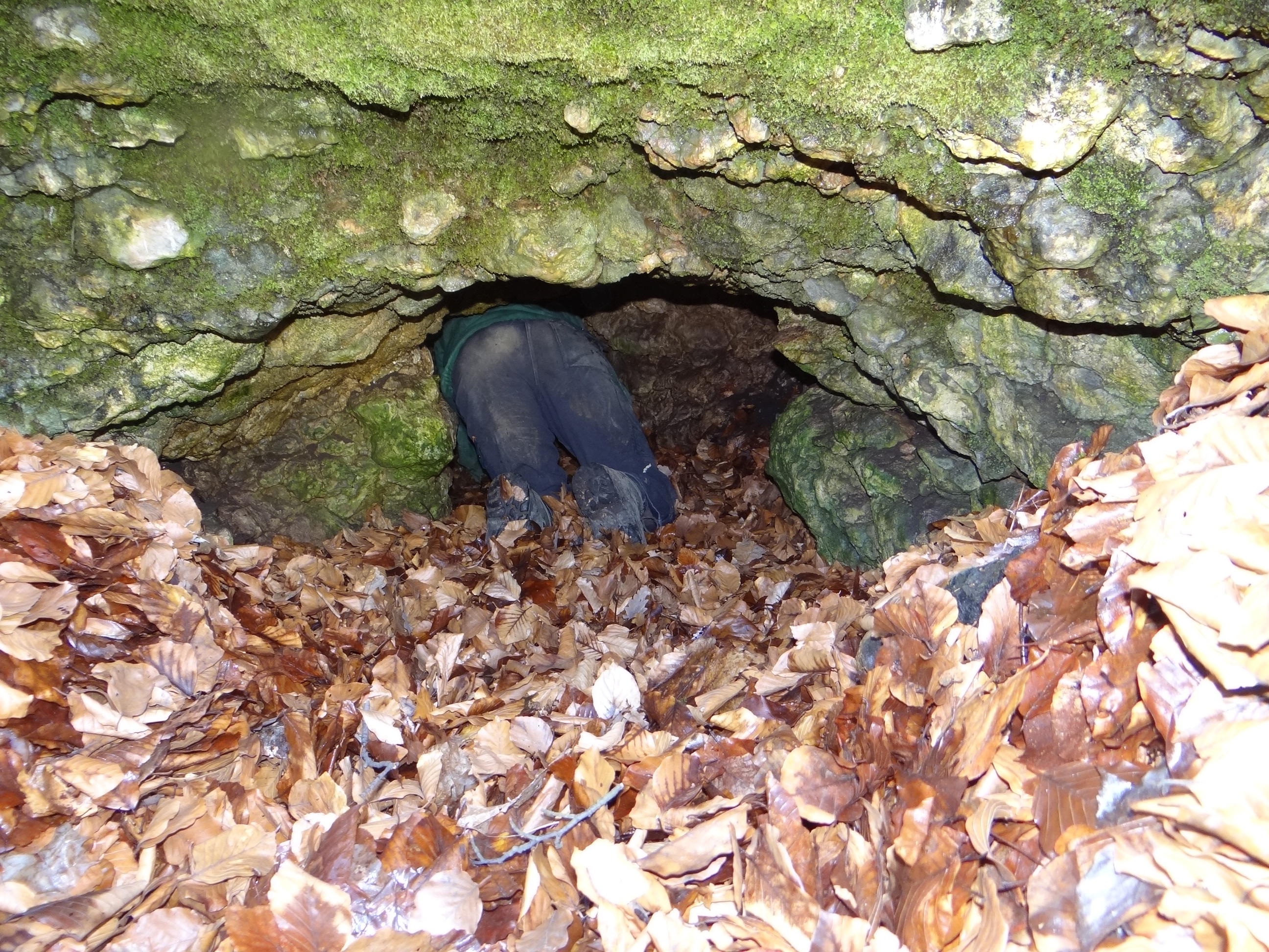 Jaskinia bez Nazwy w Wąwozie Żarskim